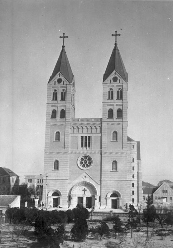 Tsingtau, St. Michaels-Kirche China, Tsingtau (Qingdao) Katholische St. Michaels-Kirche (Catholic St. Michael's Church)